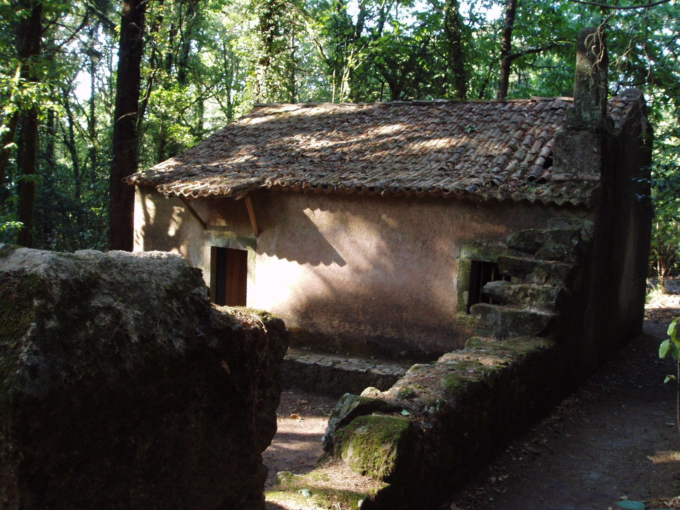 Ermita del bosque de Buçaco, en Portugal.